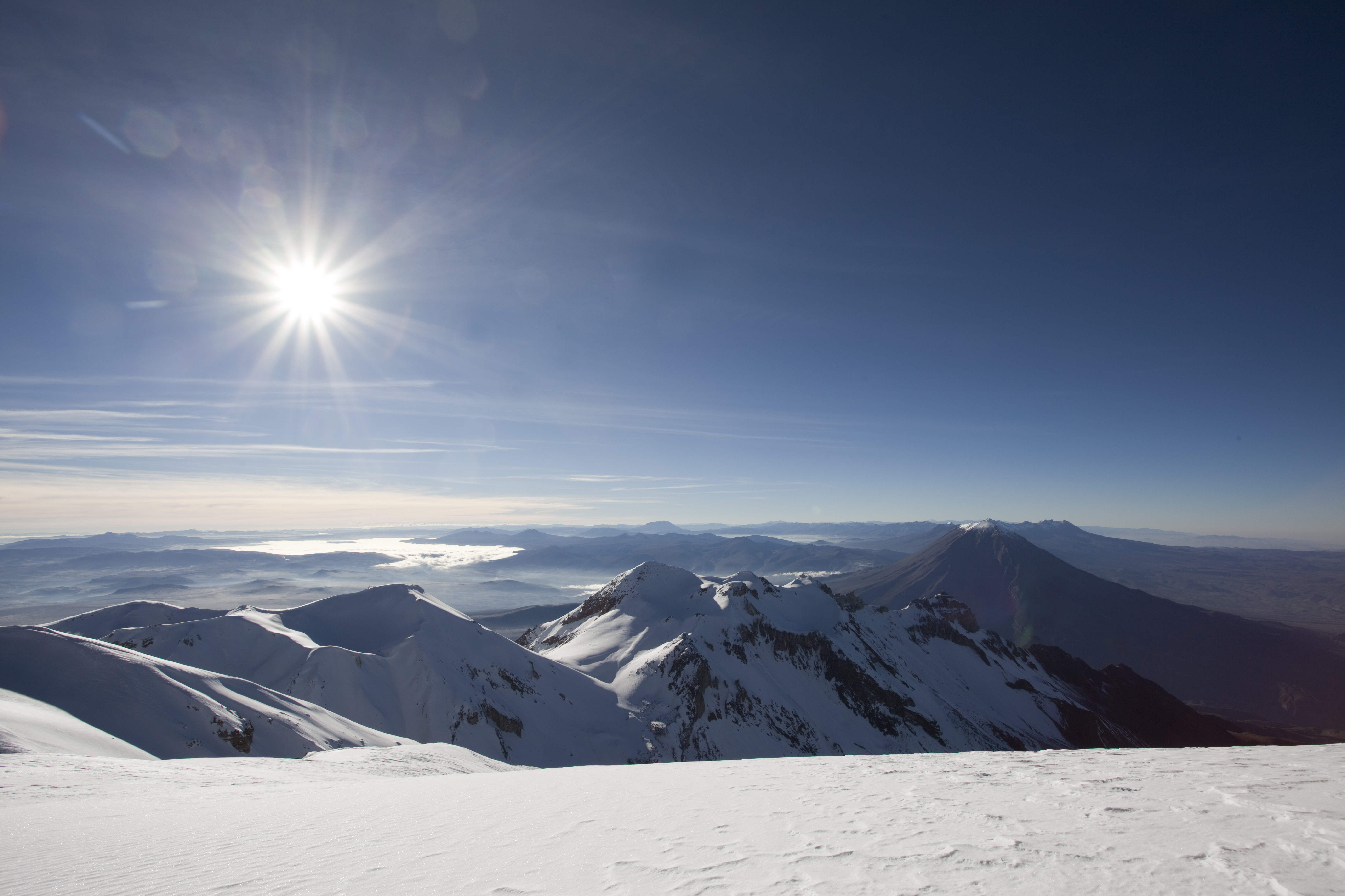 Chachani (6075m)